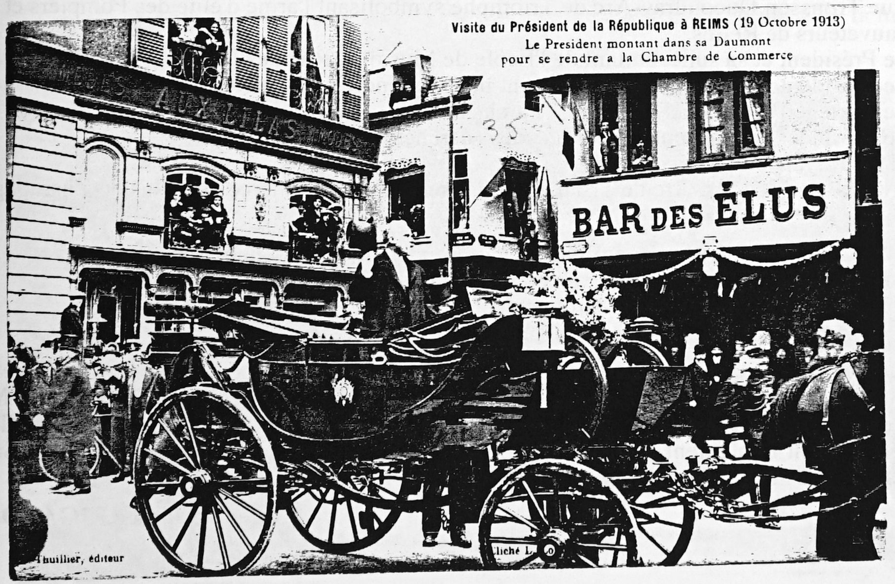 raymond poincaré dans la rue élus en 1913 à Reims.